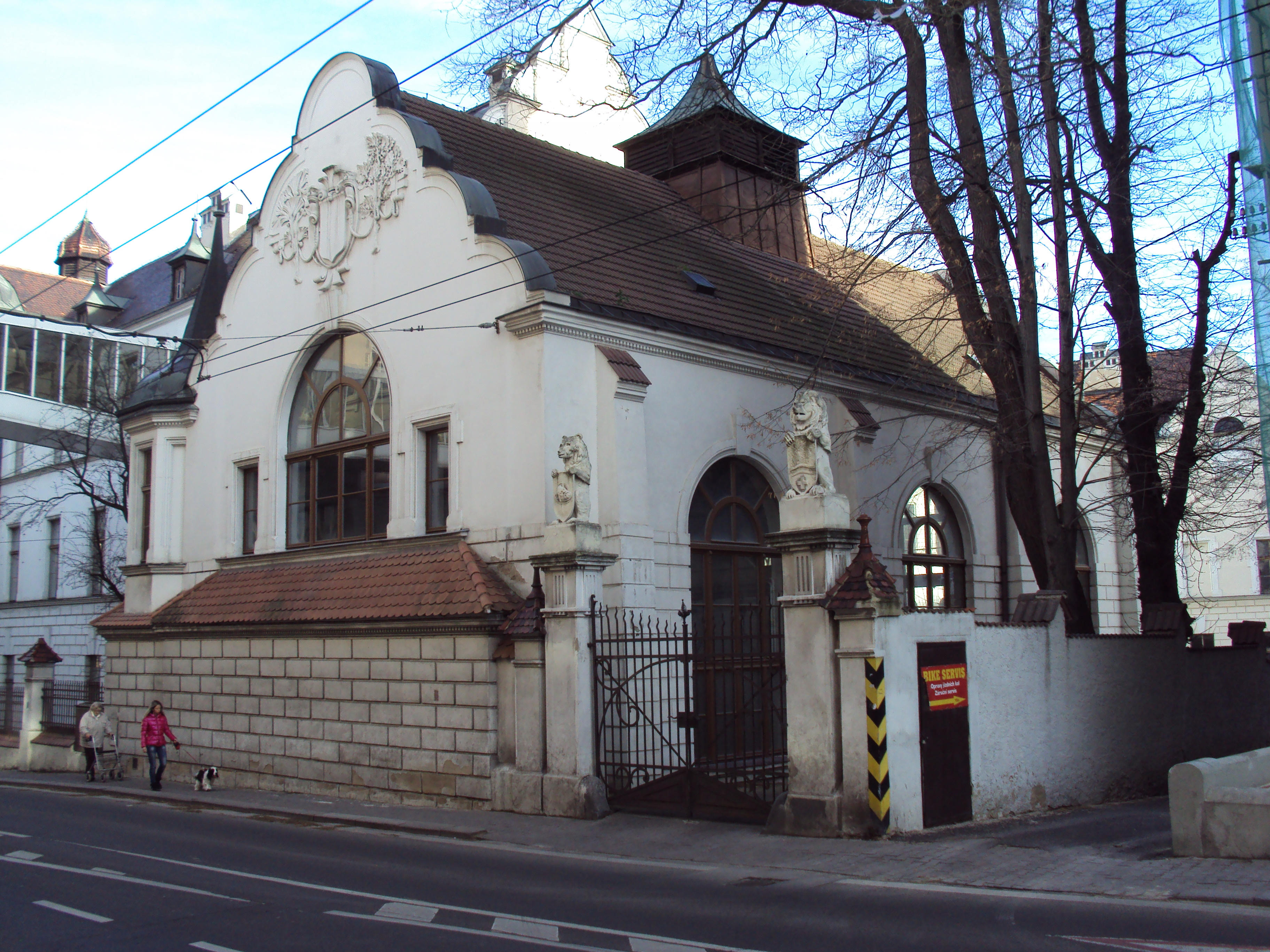 Tělocvična Gymnázia Teplice, vchod z Alejní ulice